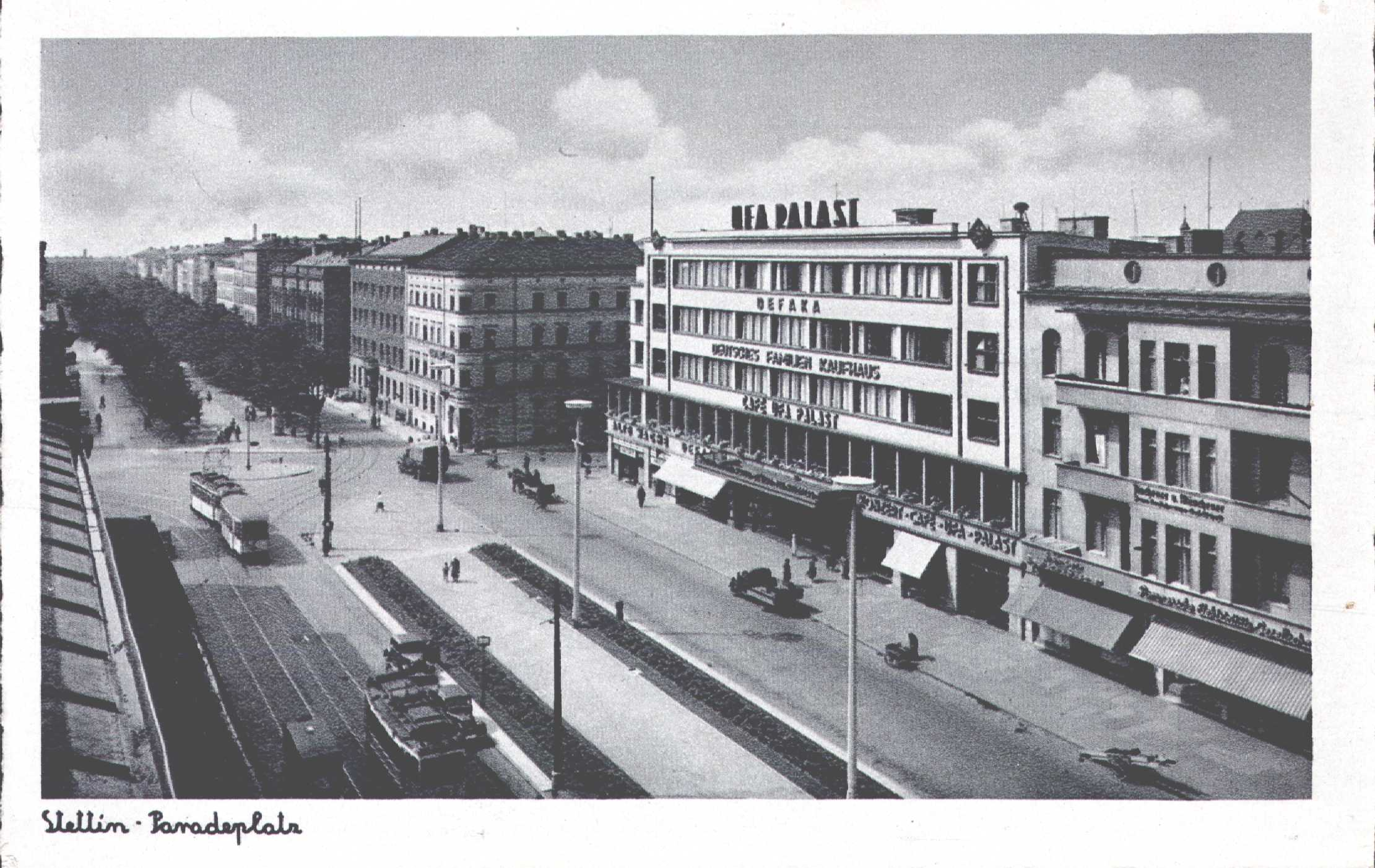 Szczecin na starej fotografii: Dom towarowy "Posejdon" (UFA Palast)